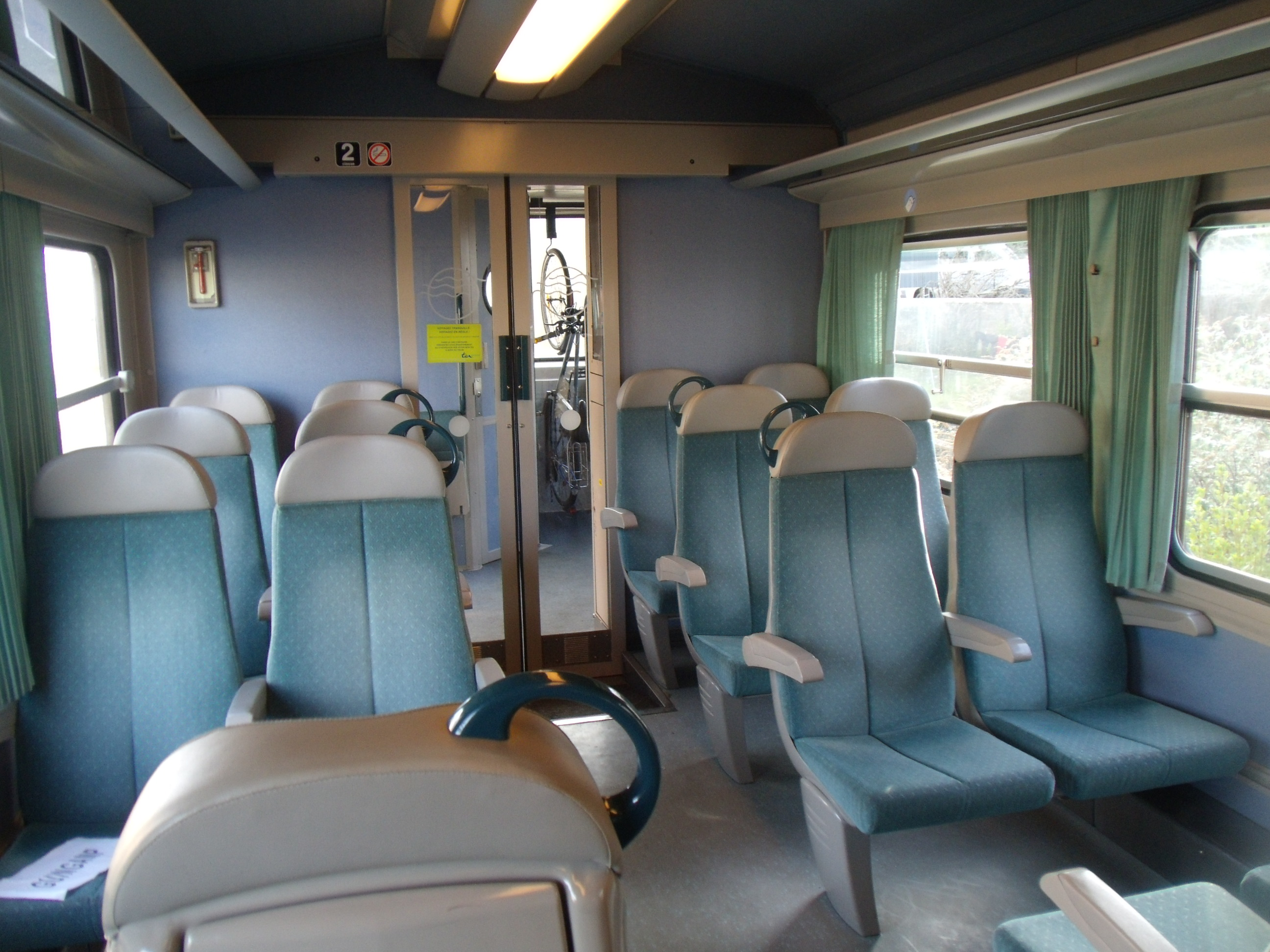 L'intérieur du X 2111 stationné en gare de Lannion en attente de départ pour Guingamp.